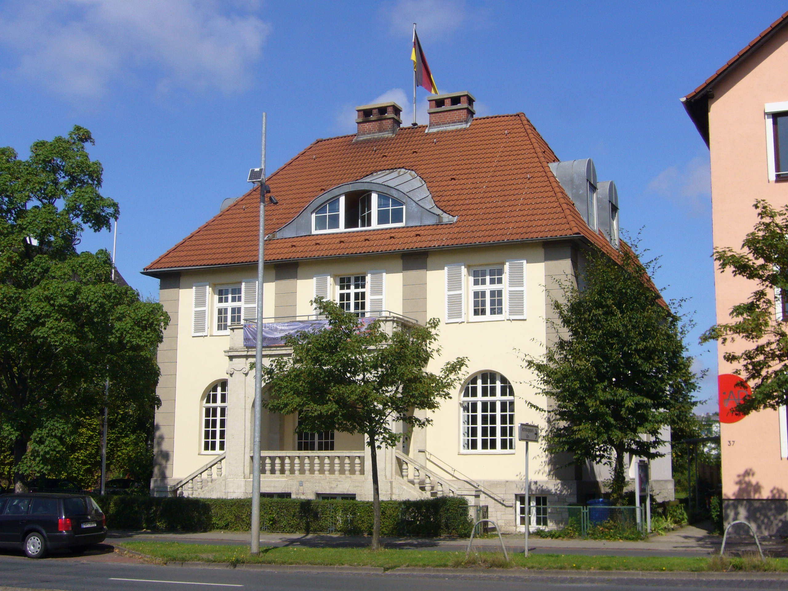 Haus der Braunschweiger Burschenschaft Germania. Das Gebäude wurde 1913 im Stil des Darmstädter Barock erbaut.